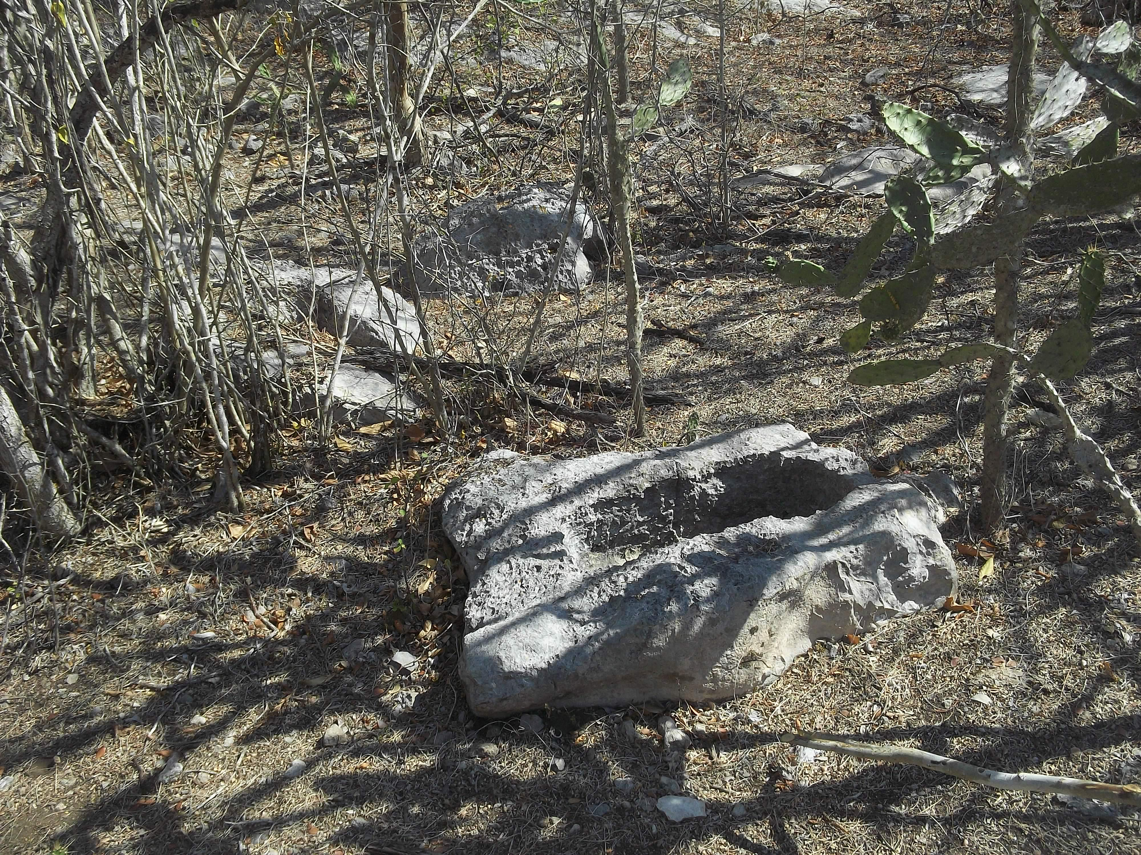 Vestigios arquelógicos en Komchén (Mérida), Yucatán.